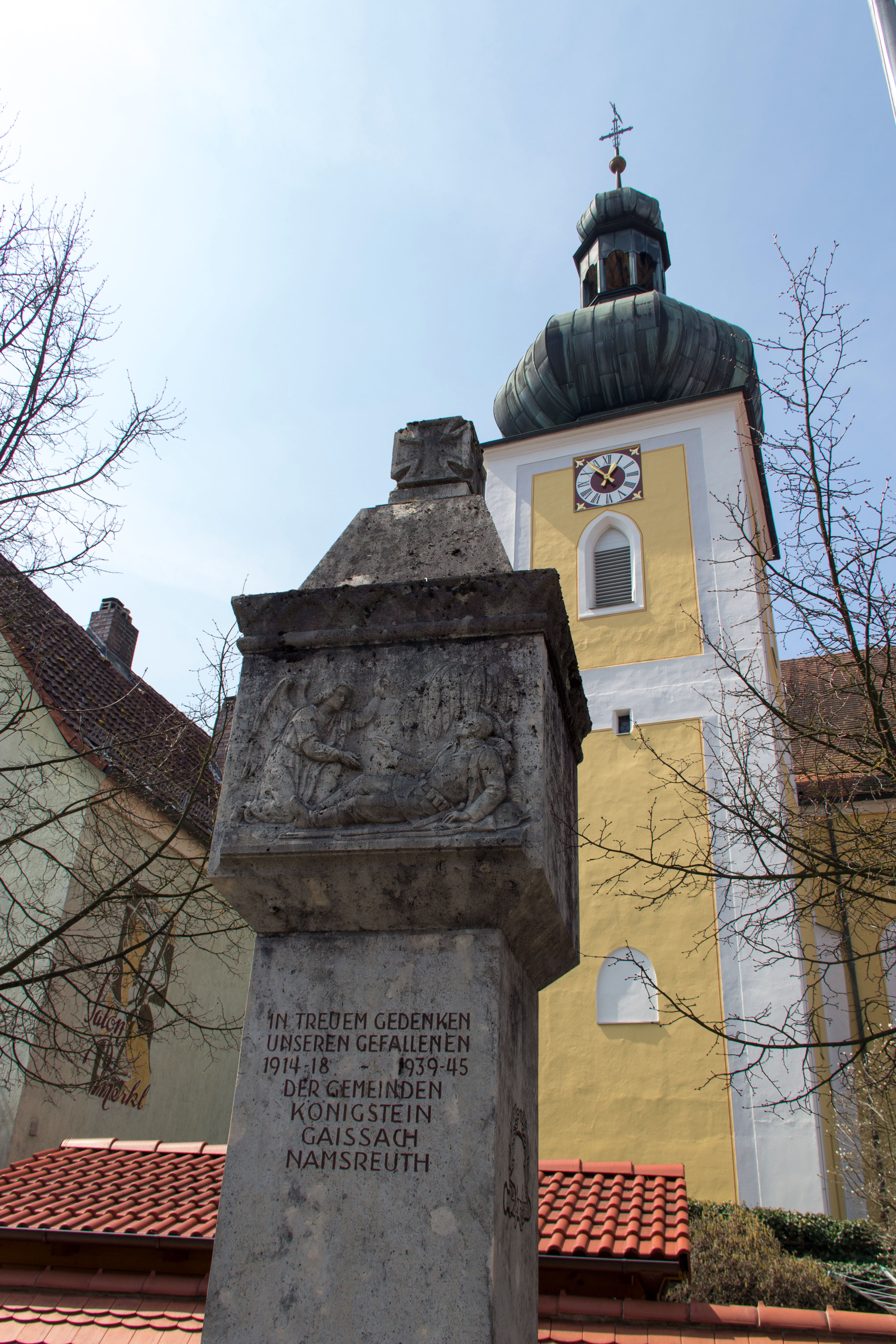 Königstein